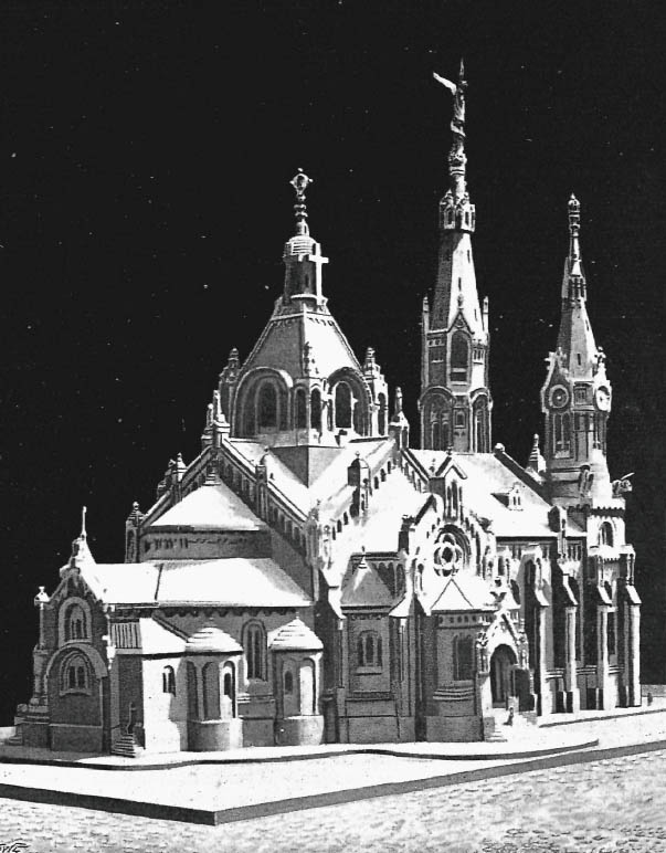 Макет до конкурсного проекту костелу Єлизавети у Львові. Архітектор Францішек Мончинський і Тадеуш Стриєнський.